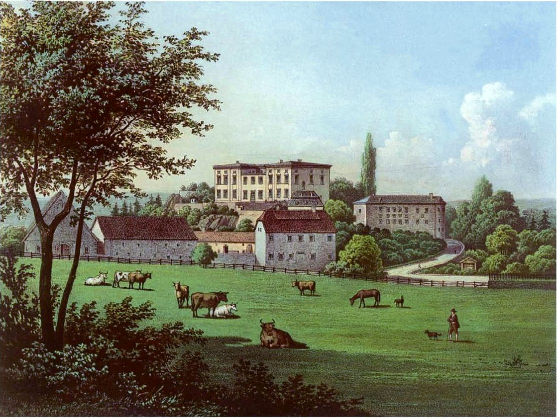 Burg Canstein, Kreis Brilon